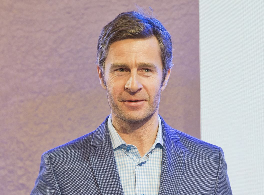 Armin Kõomägi, kultuurisõber 2017